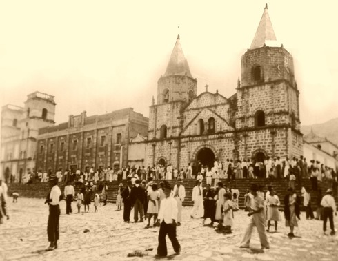 Mañana de domingo en el atrio del parque principal